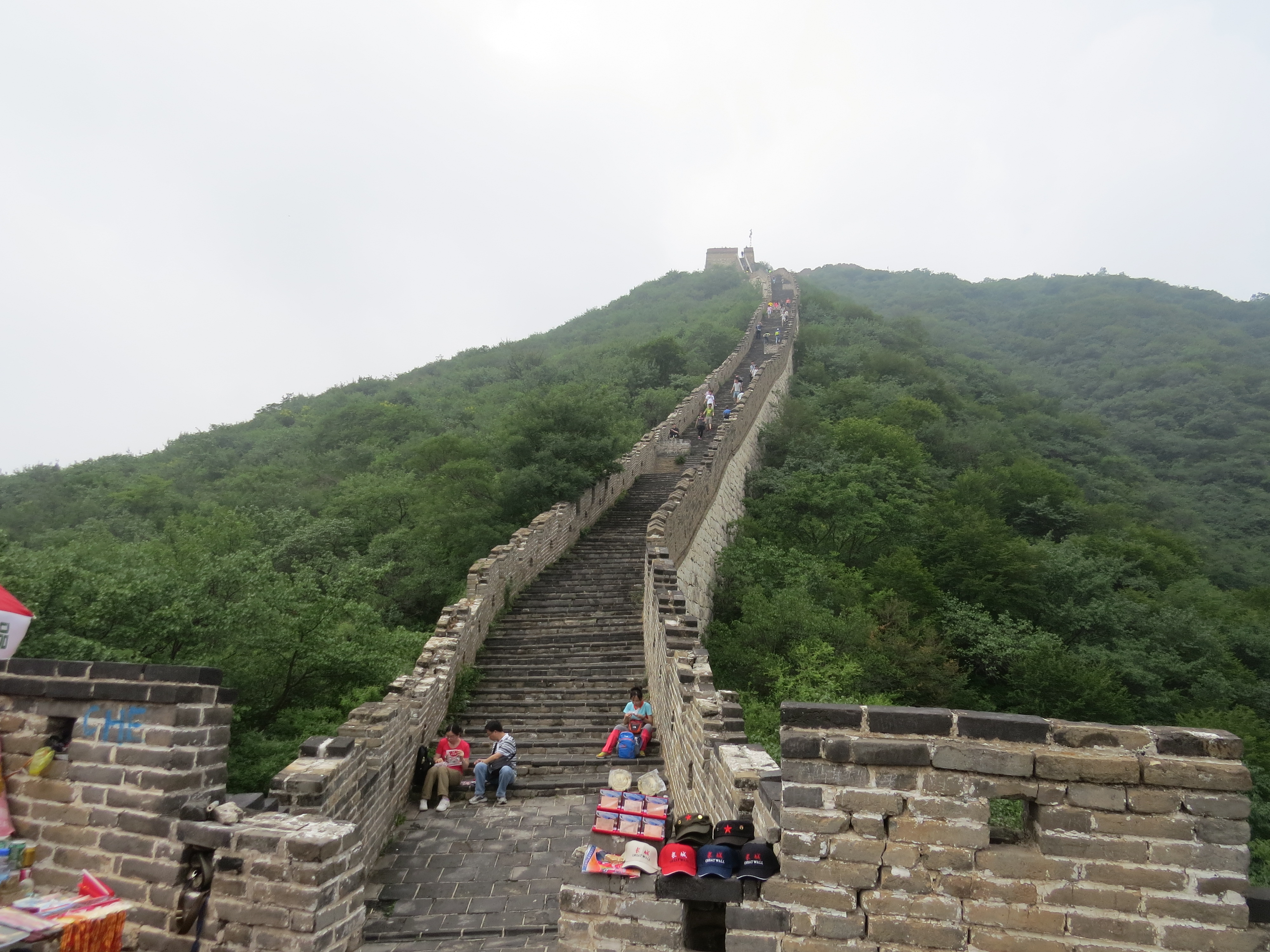 The Great Wall of China